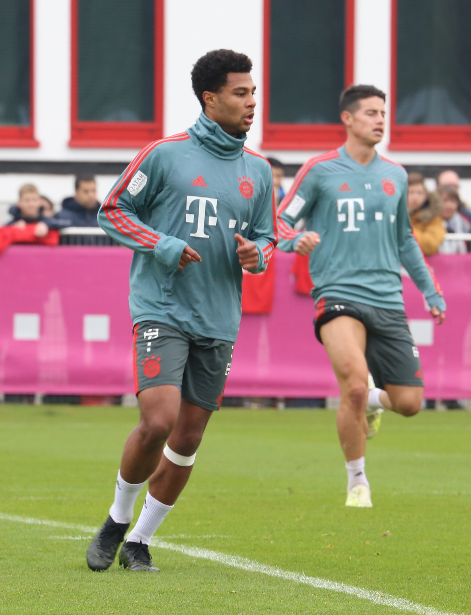 Serge Gnabry, am 10. April 2019 beim Training auf dem Gelände des FC Bayern München